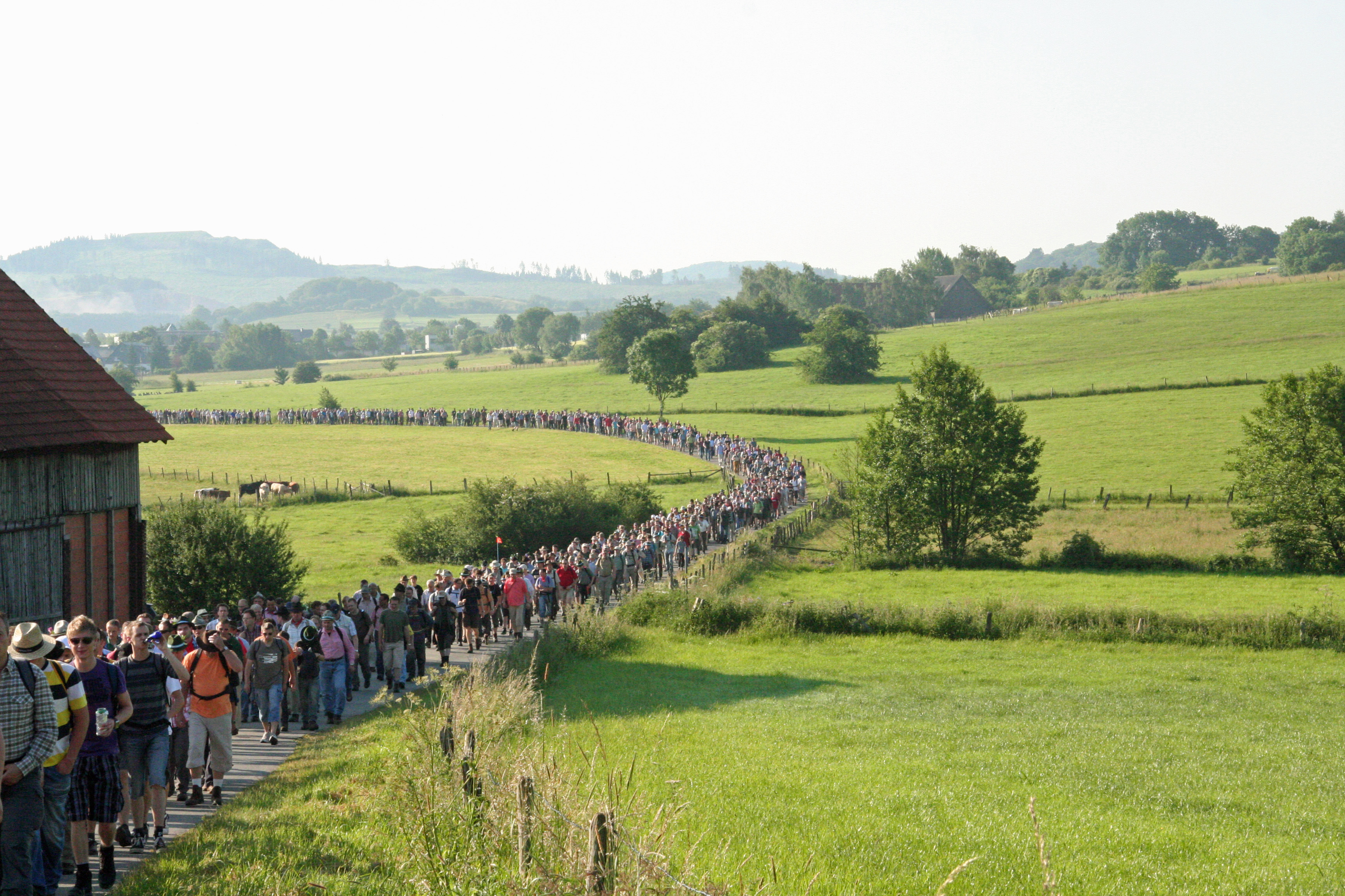 Schnadezug 2010 in der Briloner Feldflur